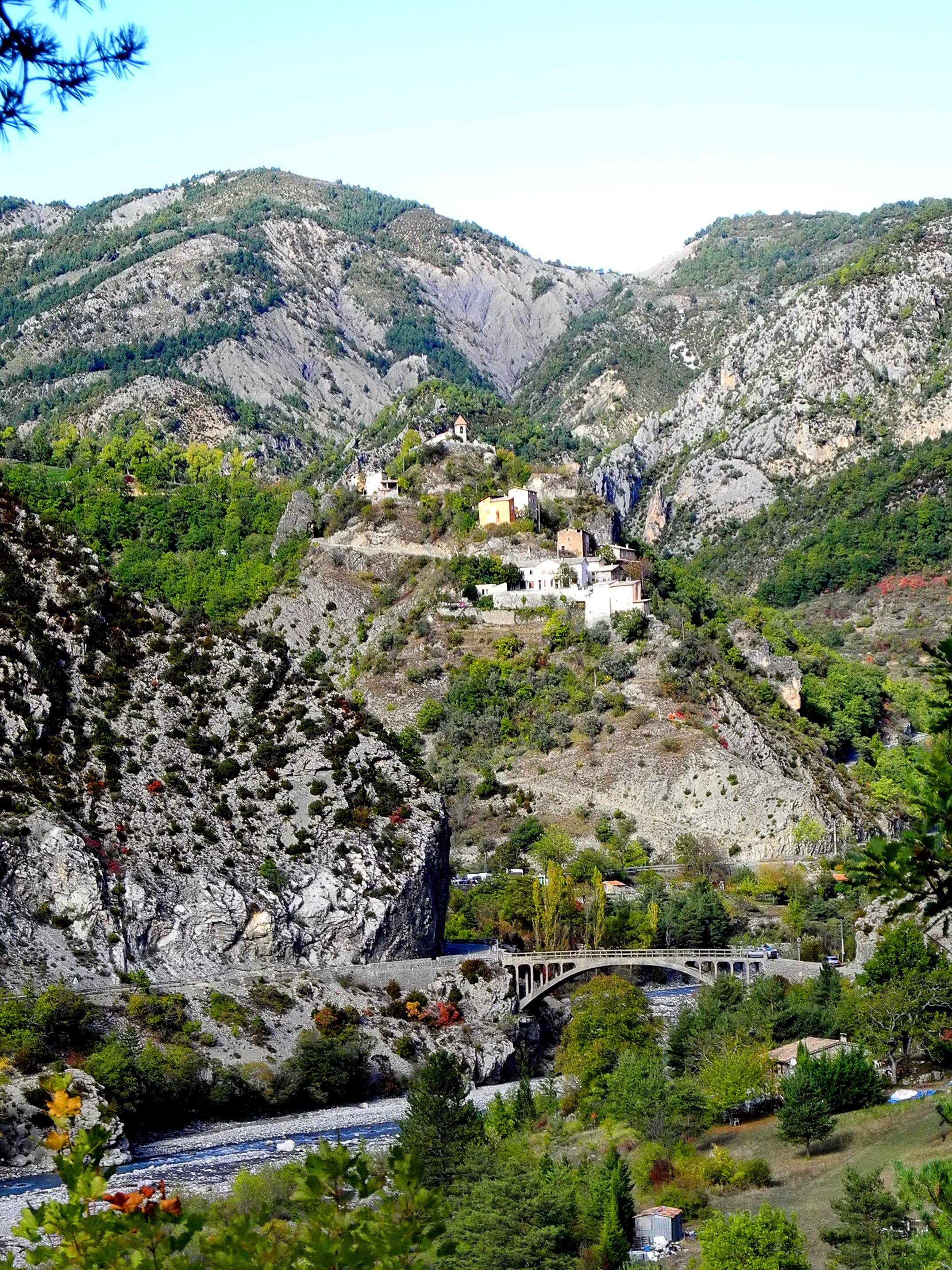 Daluis